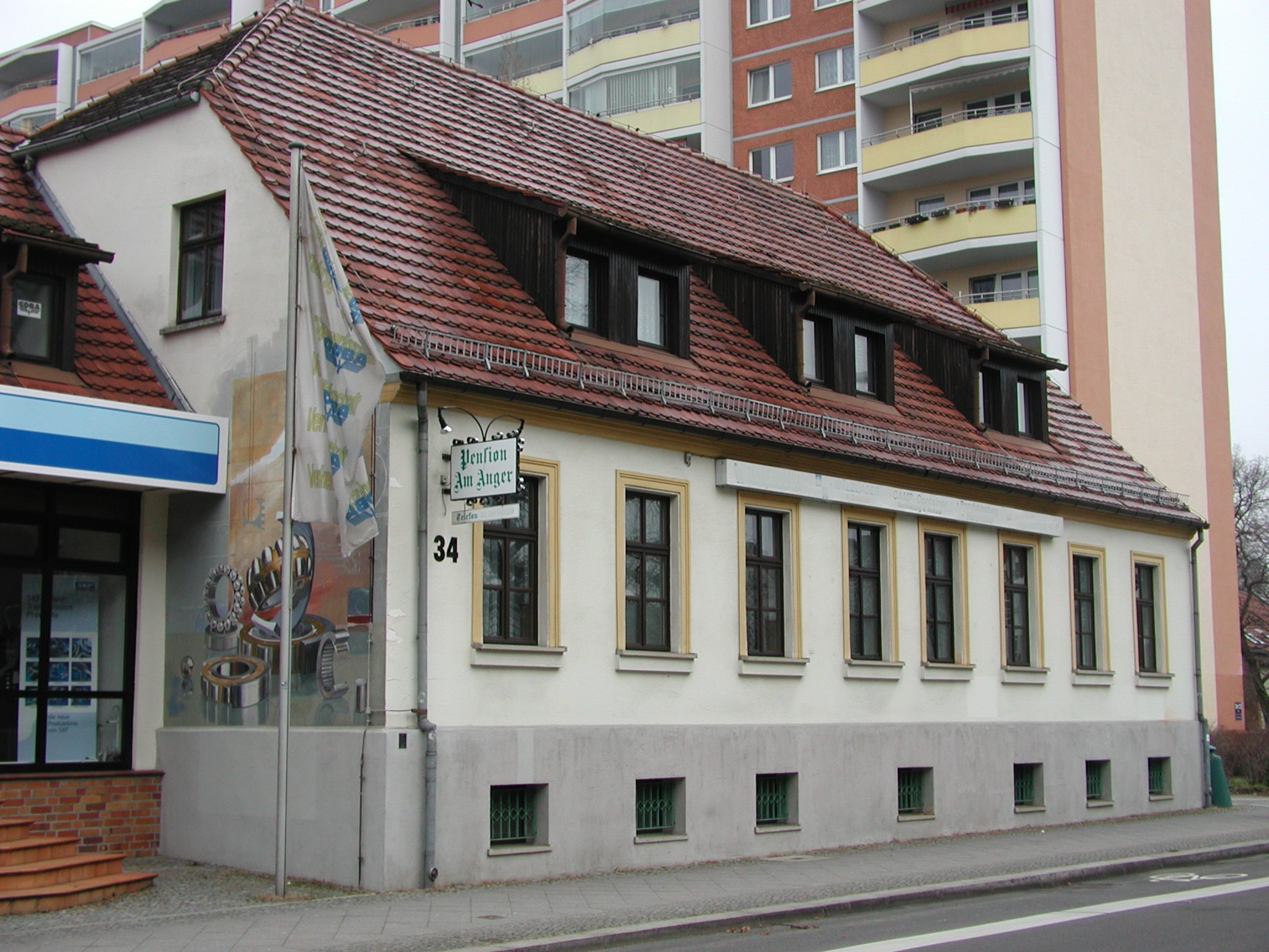 eh. (Guts-)Inspektorhaus, Alfred-Kowalke-Str. 34